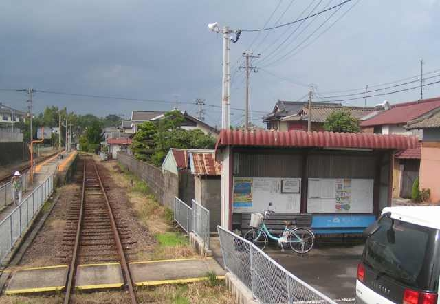 三会駅ホーム 投稿者が撮影(2006/08/27)